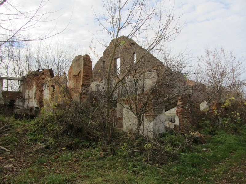 Туча. Спіртзавод